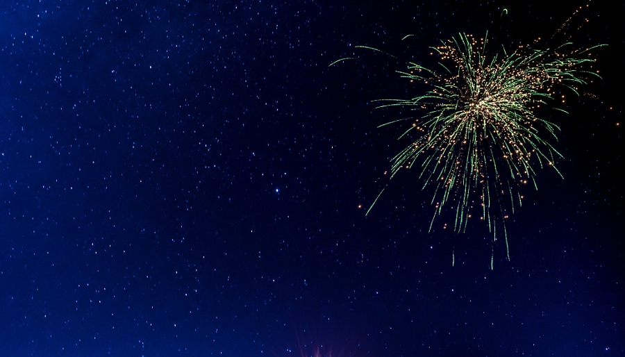 Фейерверк на празднике Дивали